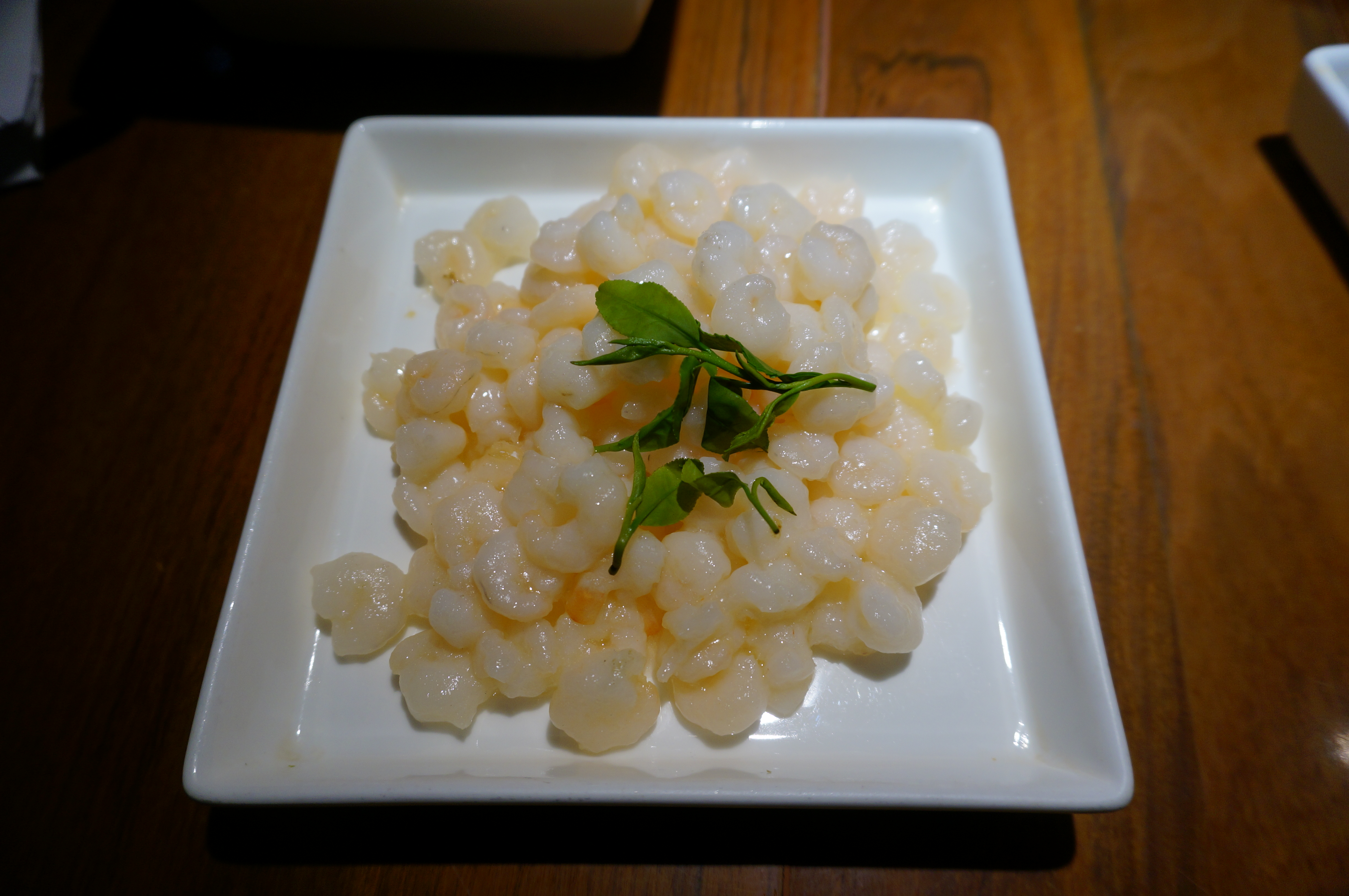 龙井虾仁，摄于杭州酒家（上城区延安路205号）。